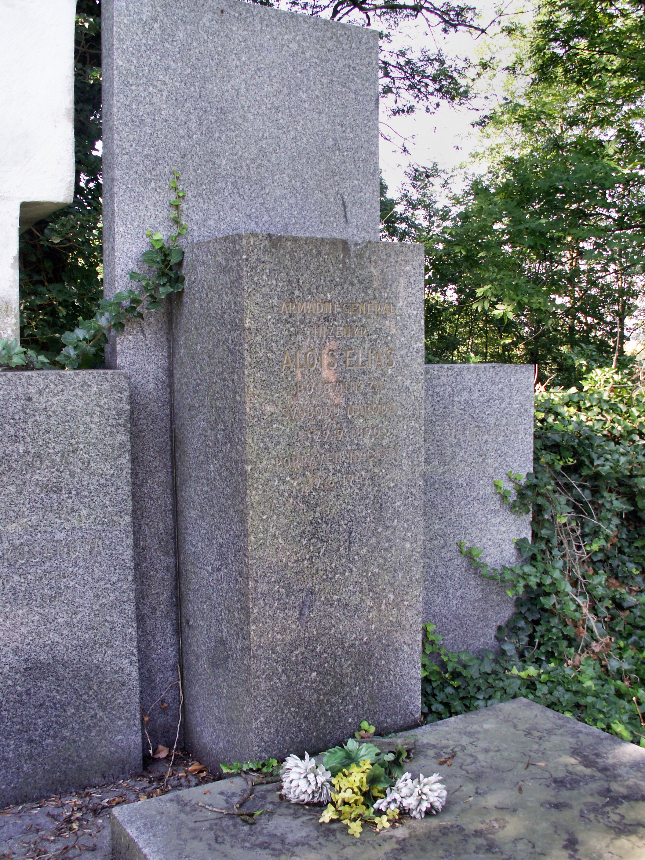 Markovice, část obce Žleby, okres Kutná Hora, hrob Aloise Eliáše u kostela sv. Marka